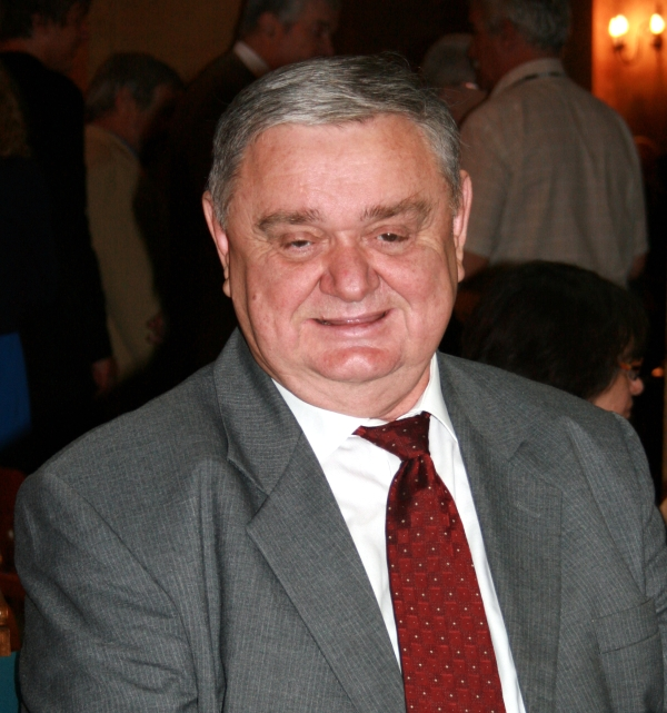 Stjepan Damjanović, svečano proglašenje i predstavljanje novih članova Hrvatske akademije znanosti i umjetnosti u Zagrebu